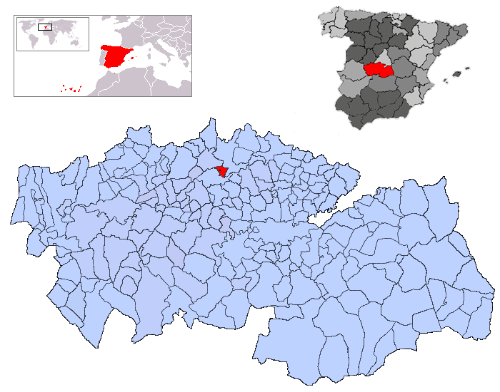 Quismondo en la provincia de Toledo